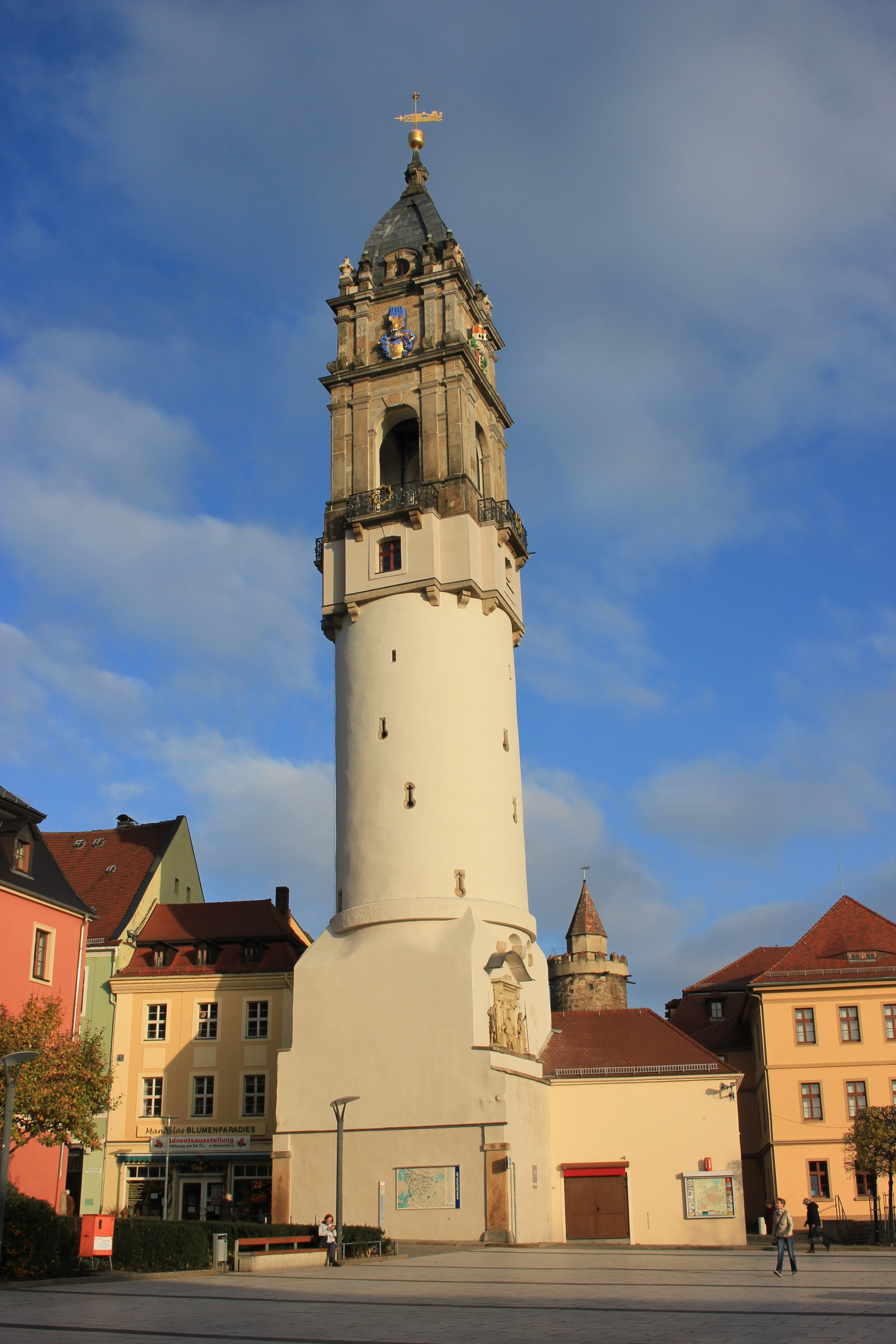 Hornjoserbsce: Bohata wěža po saněrowanju w lěće 2017.